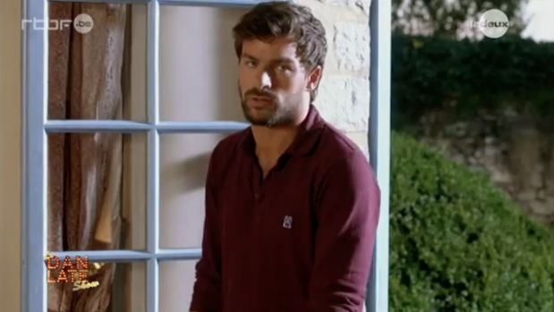 Thomas Ancora dans clem saison 5